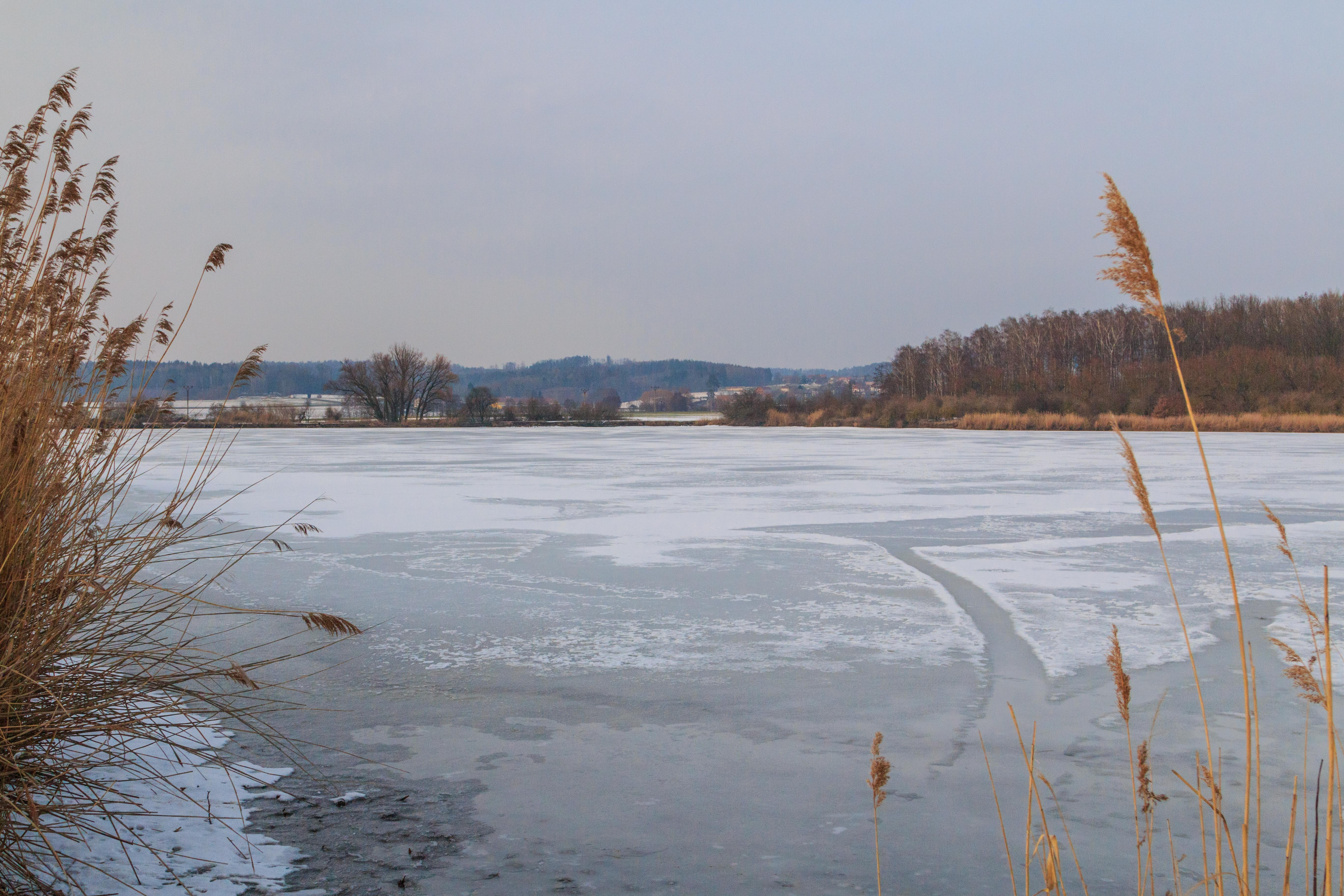 Rybník Nohavička u Veliše